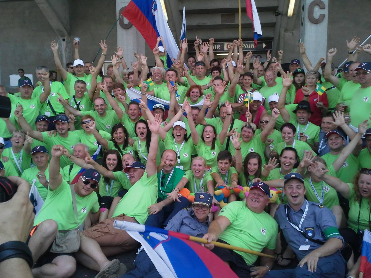 PGD Hajdoše